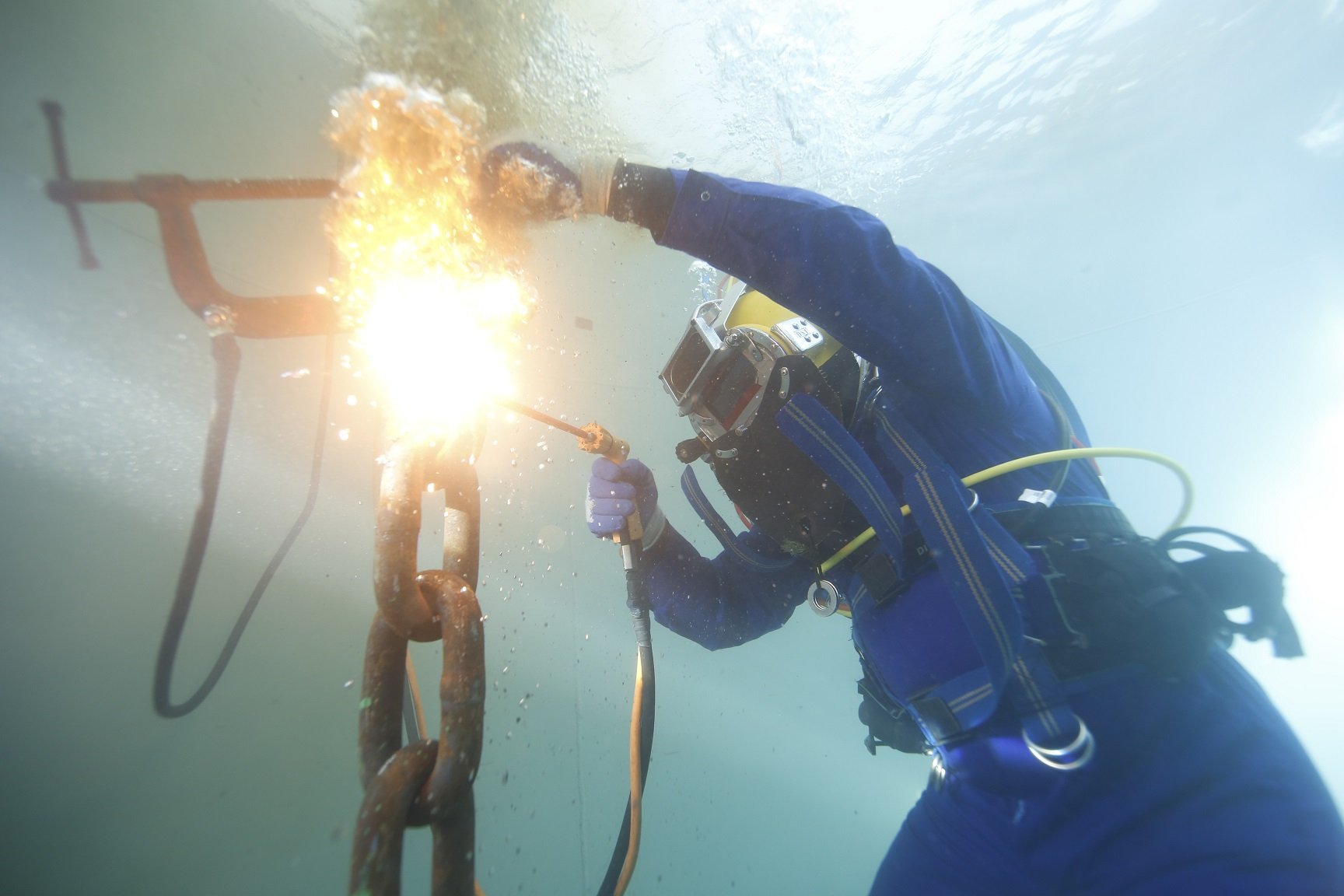 עבודות ריתוך תת מימי